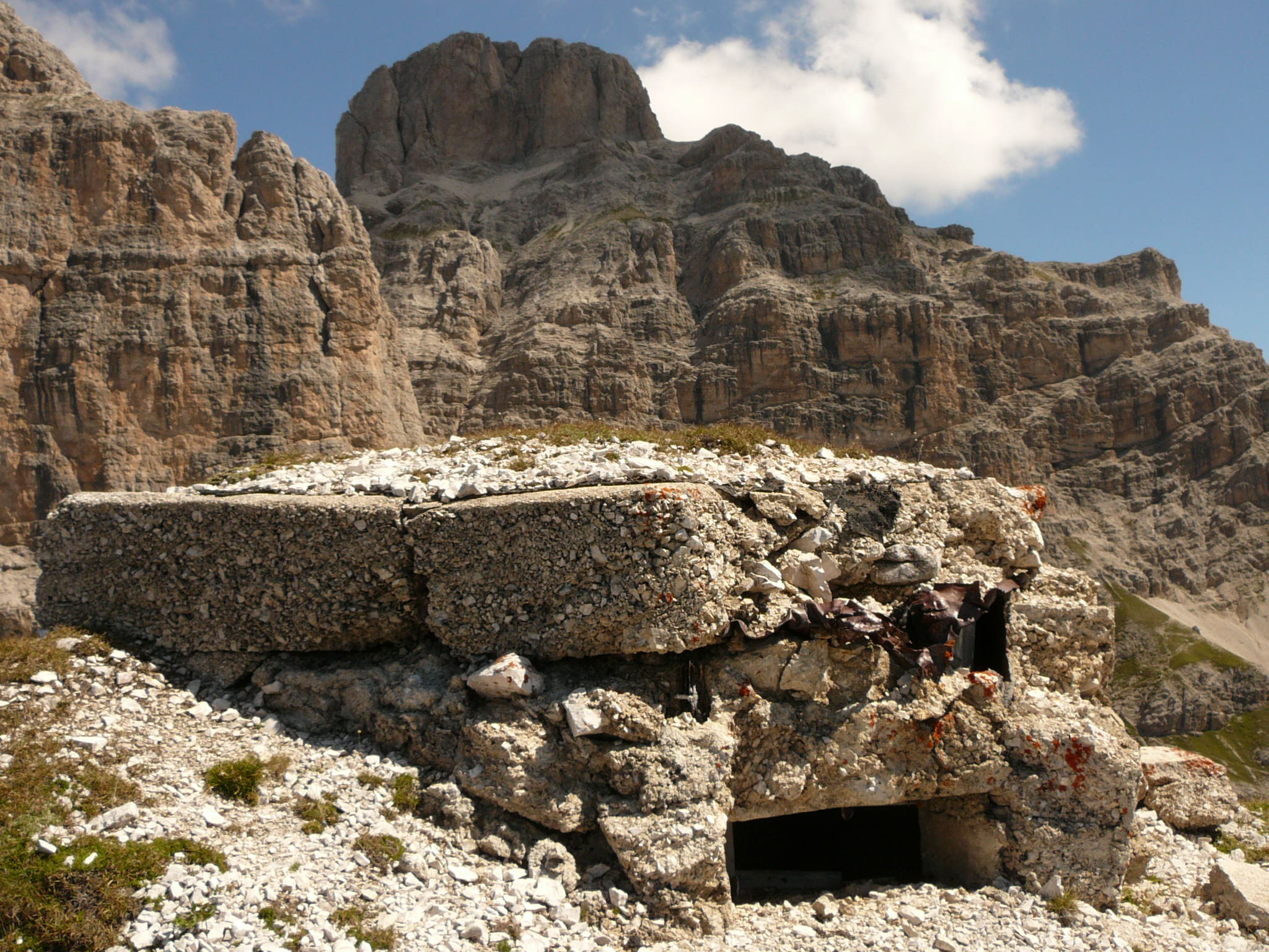 Teston monte RUdo